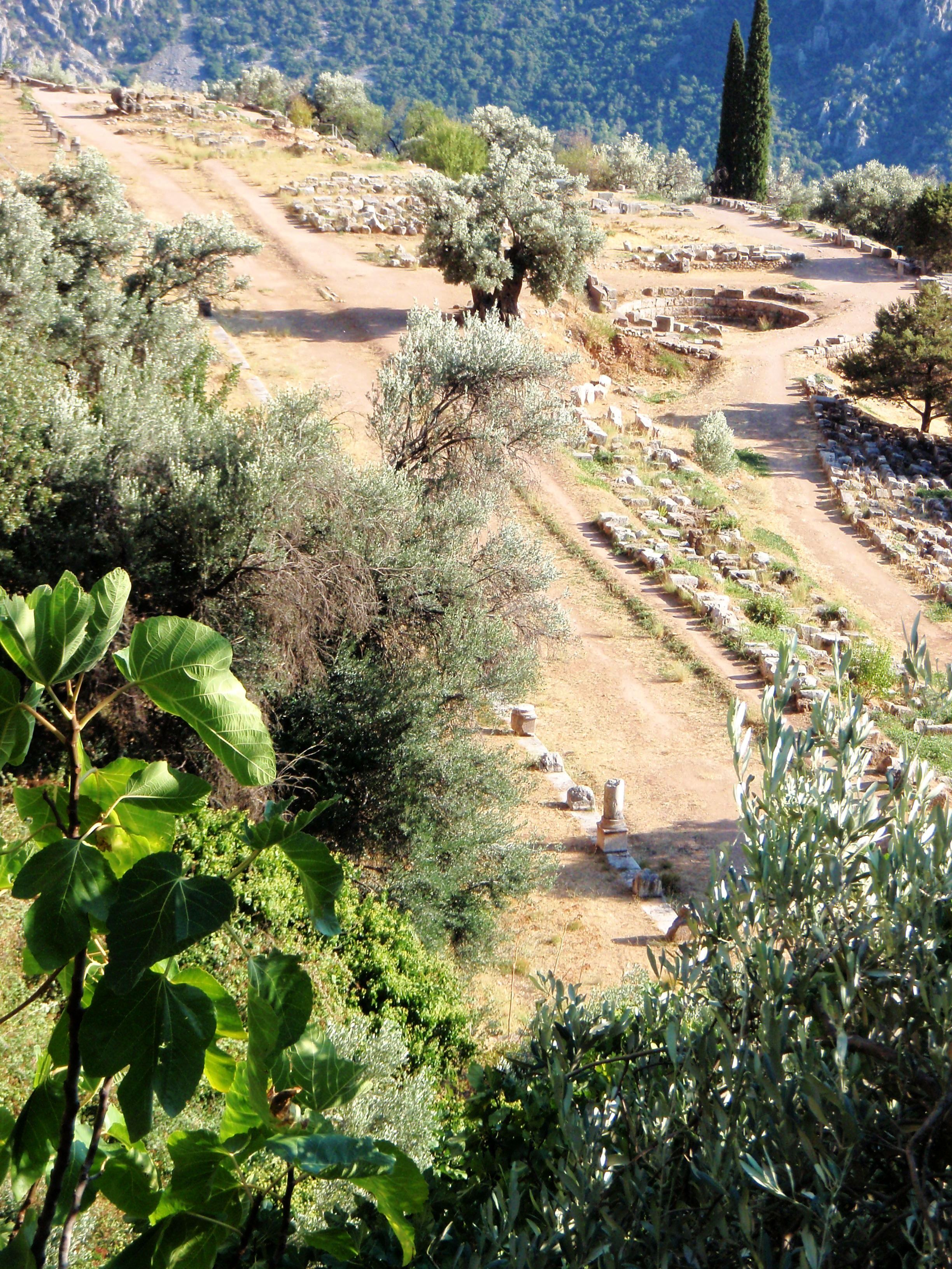 Ruiny po kompleksie sportowym